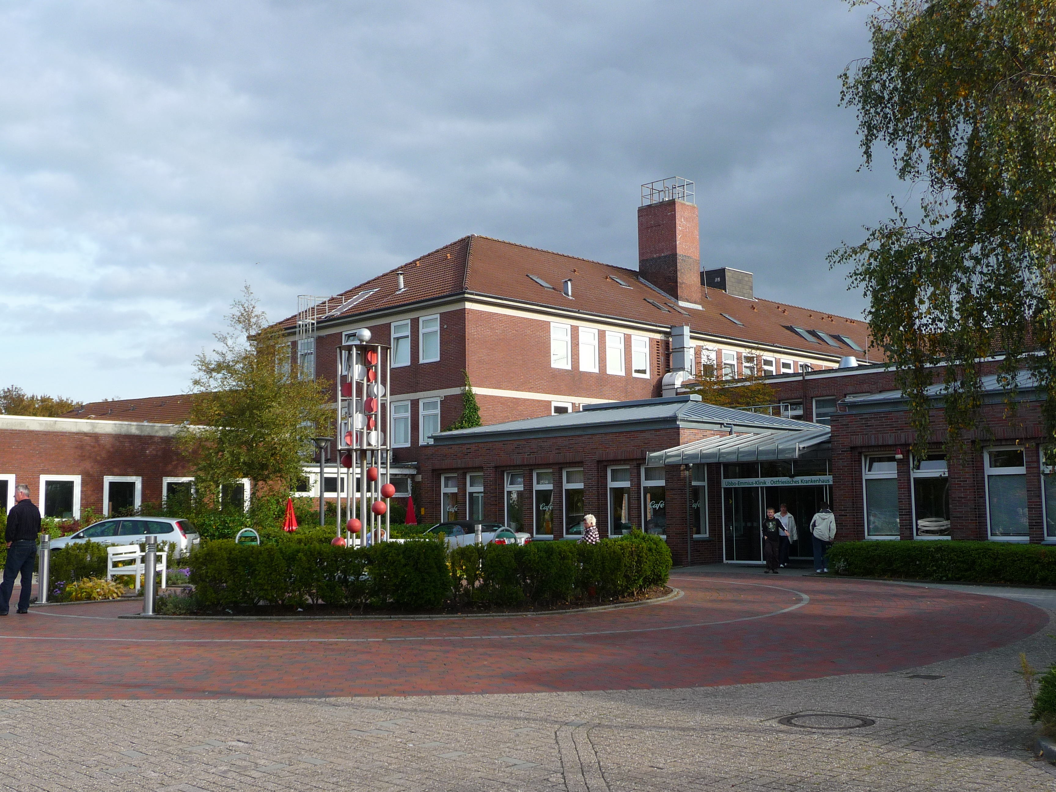 Haupteingang der Ubbo-Emmius-Klinik, Ostfriesisches Krankenhaus in Norden (Niedersachsen, Deutschland)